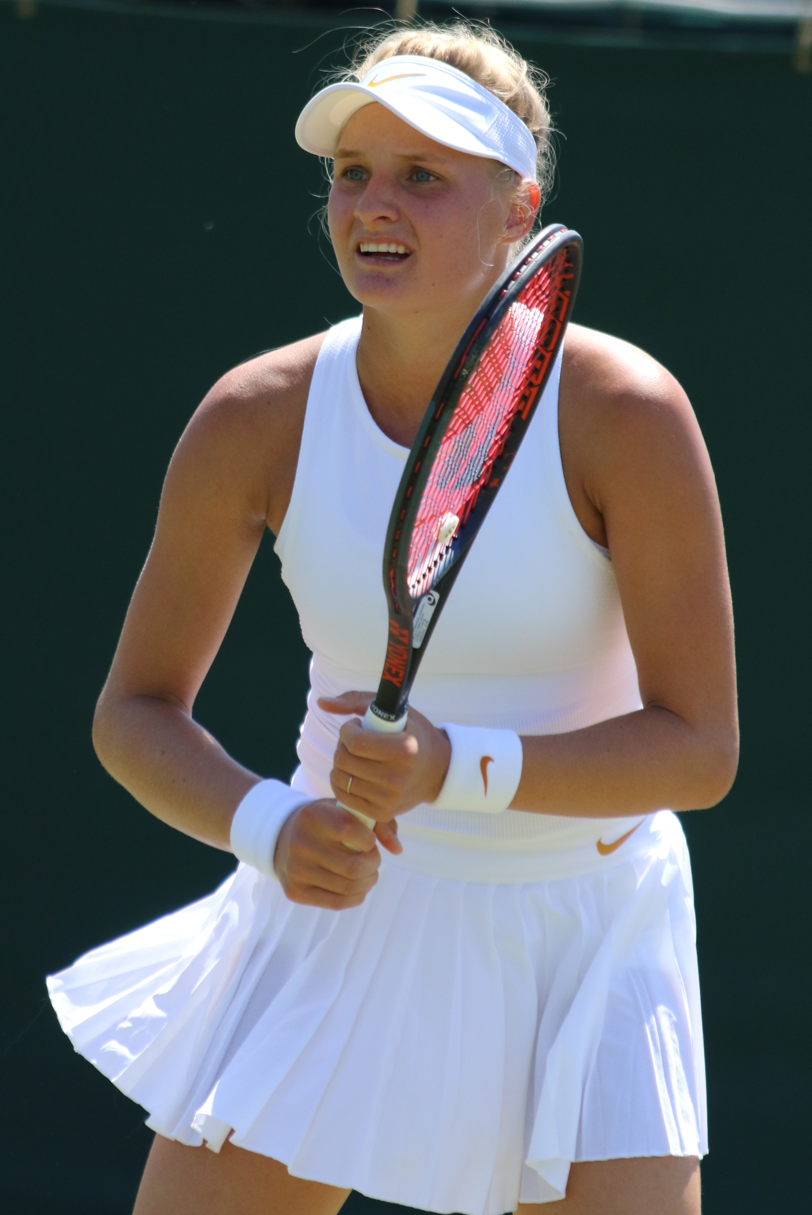 Yastremska WMQ18 (25)